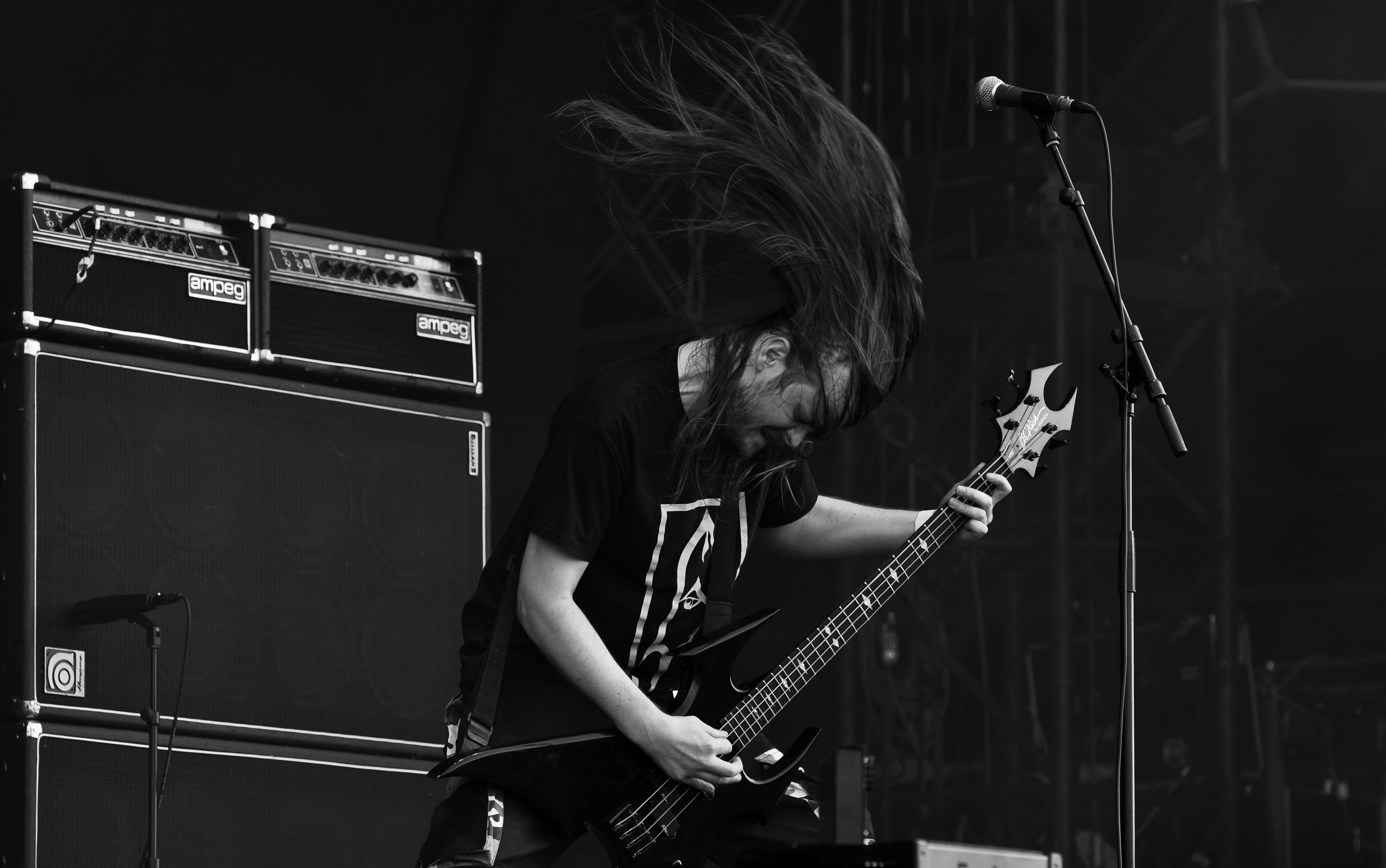 02-08-2014-Emperor at Wacken Open Air 2014-JonasR 07